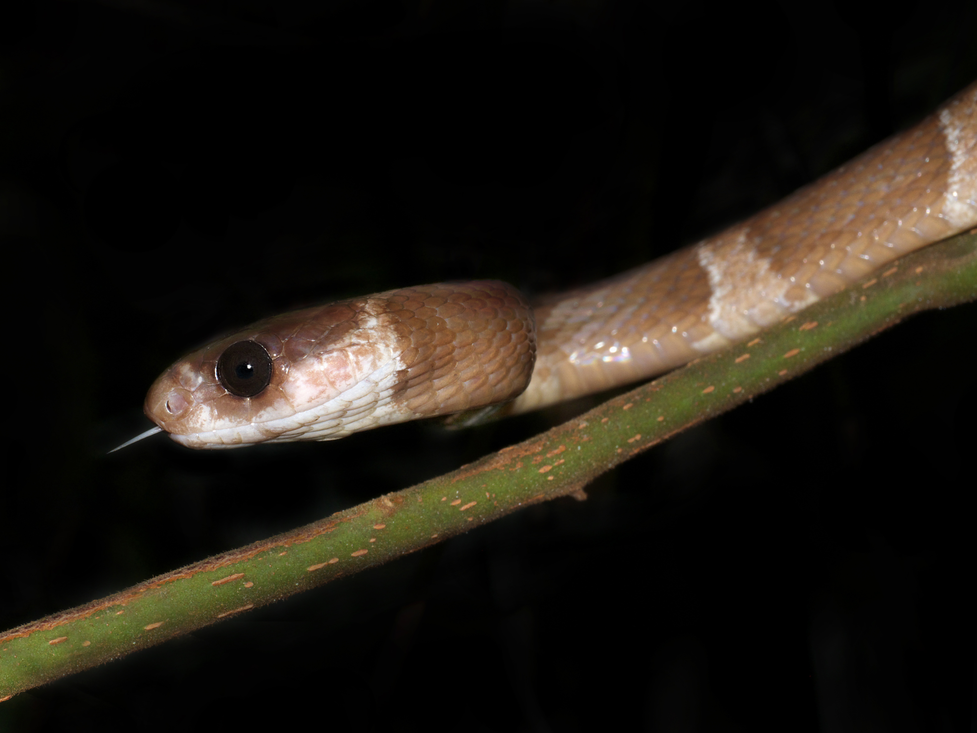 Panasonic GX7 + Leica DG Macro-Elmarit 45mm F2.8 ASPH OIS